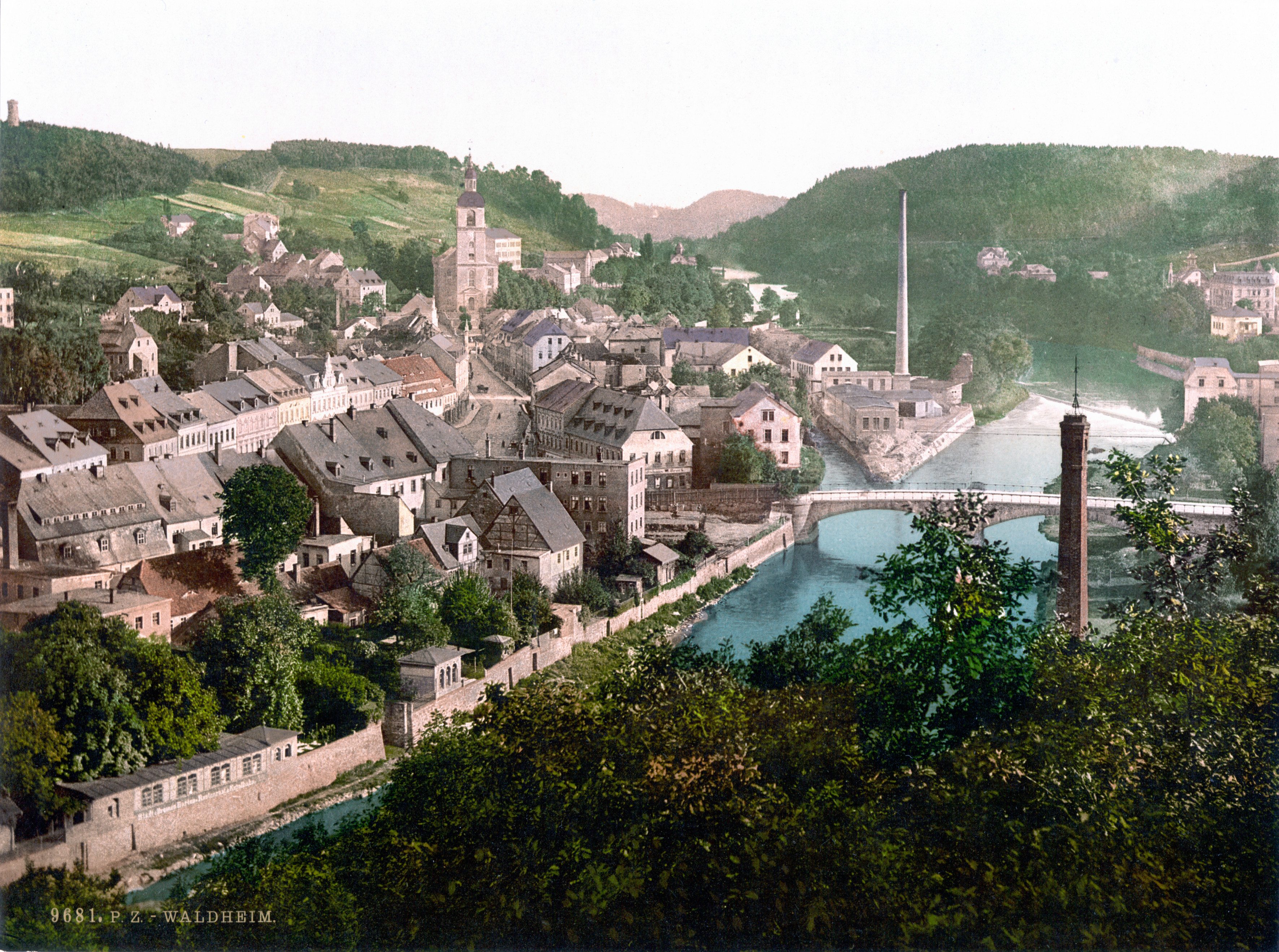 Waldheim